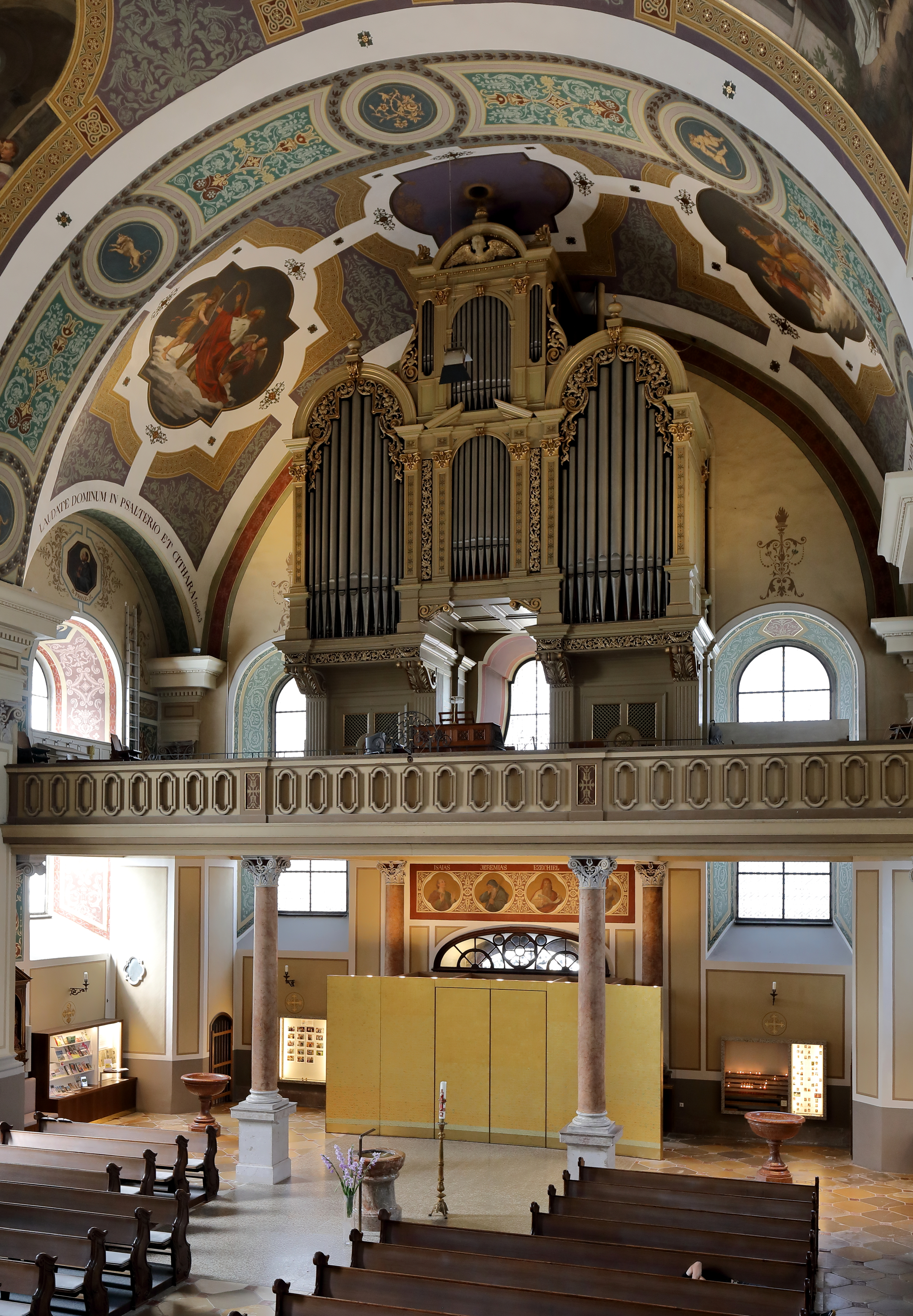 Innenansicht der röm.-kath. Stadtpfarrkirche hl. Nikolaus in der oberösterreichischen Stadtgemeinde Bad Ischl in Richtung Orgelempore.Die Kirche wurde bis auf den Kirchturm anstelle einer Vorgängerkirche zwischen 1771 und 1780 errichtet. Die Orgel ist ein Werk von Matthäus Mauracher aus dem Jahr 1888. Sie wurde zwischen 1908 und 1910 erweitert und 1992/93 von Rieger Orgelbau restauriert. Die Fresken schuf der Kirchenmaler Georg Mader im Zuge einer großen Renovierung und Umgestaltung des Kircheninneren zwischen 1874 und 1880.